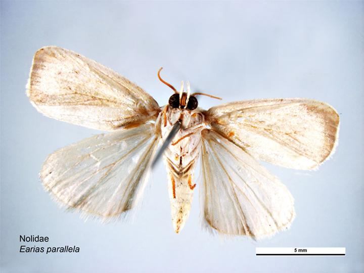 Earias parallela ventral view